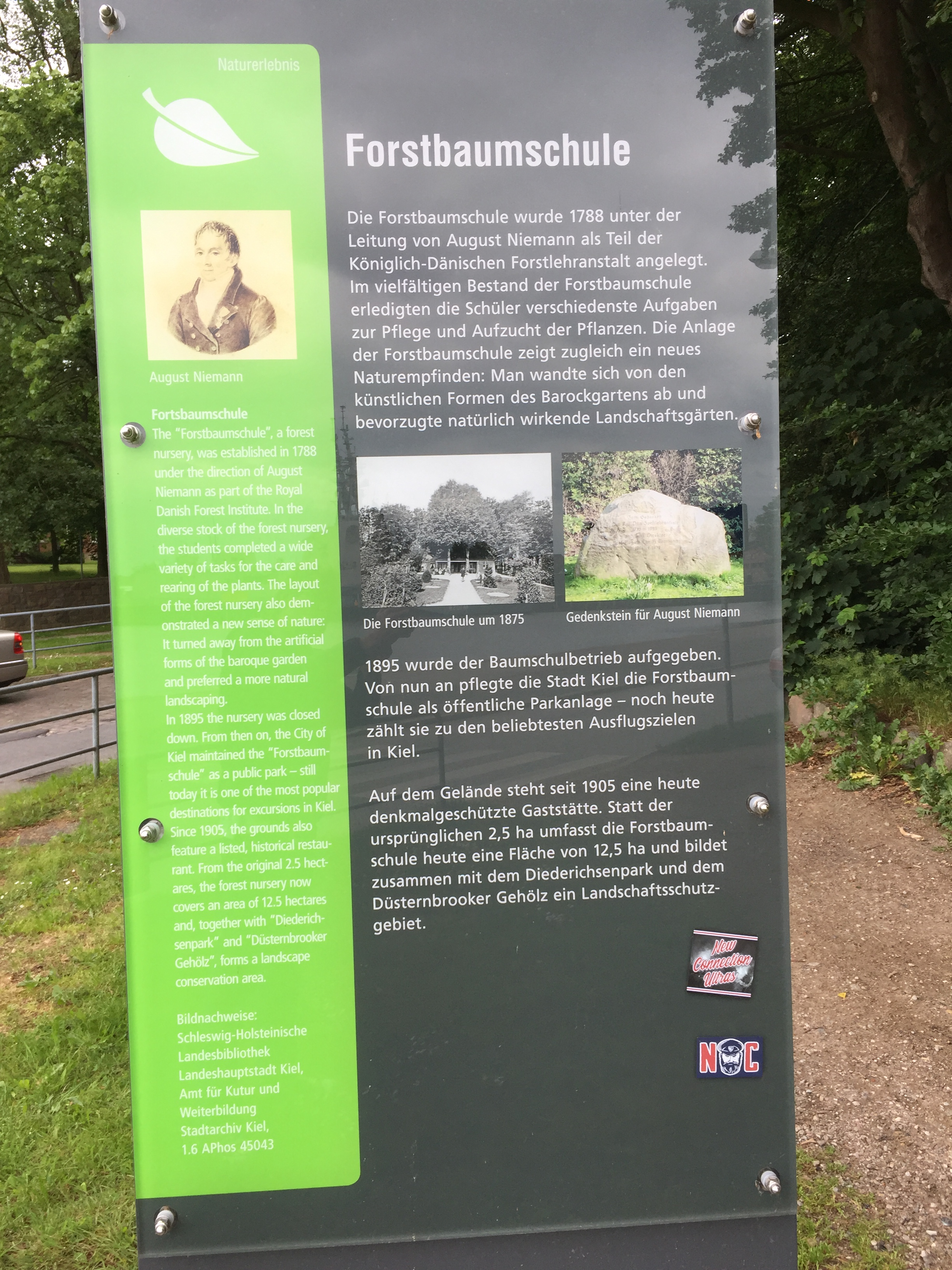 Forstbaumschule Kiel - Infotafel